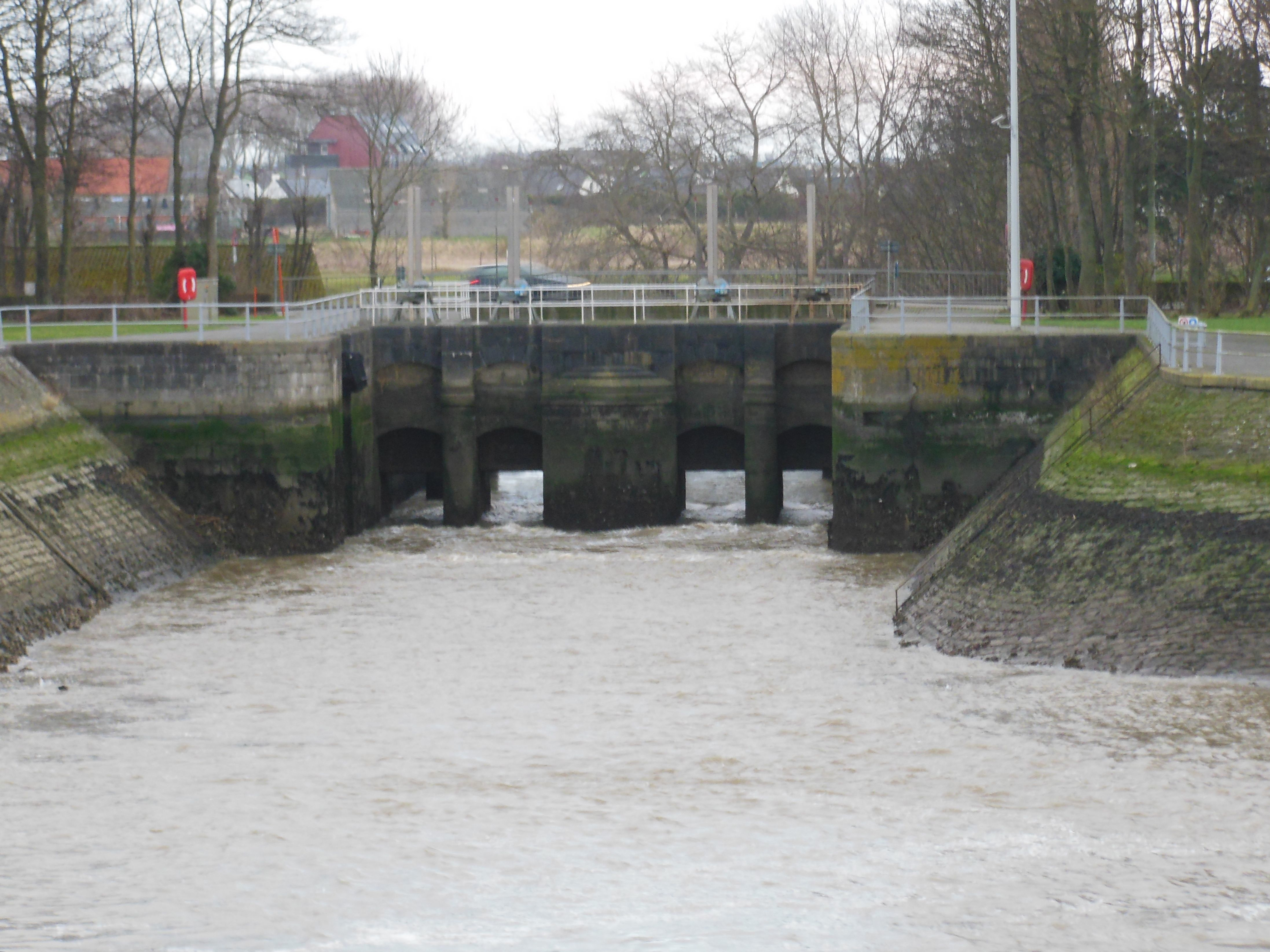 Geopende overlaten van het Scheursas, ook Springsas genoemd